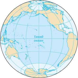 Карта Тихого океану